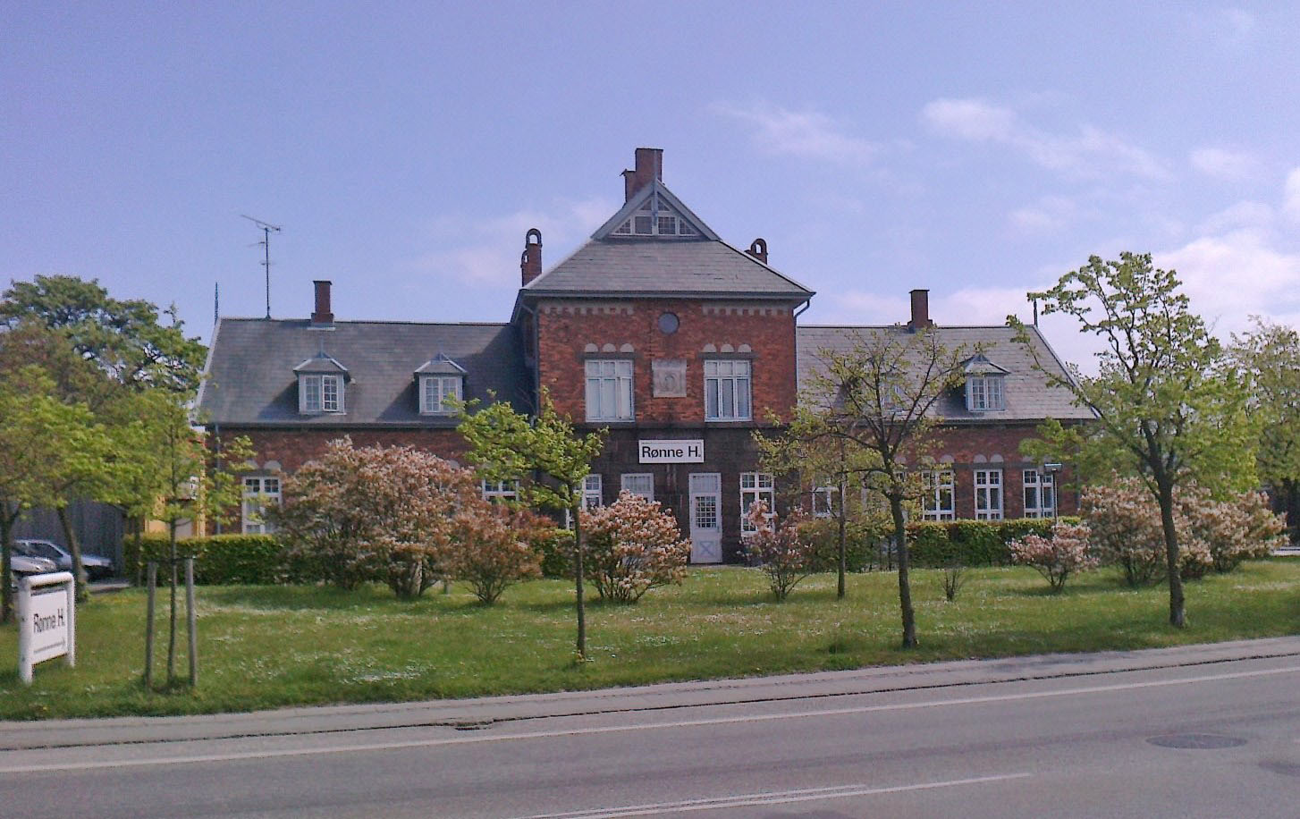 Rønne H, sporside